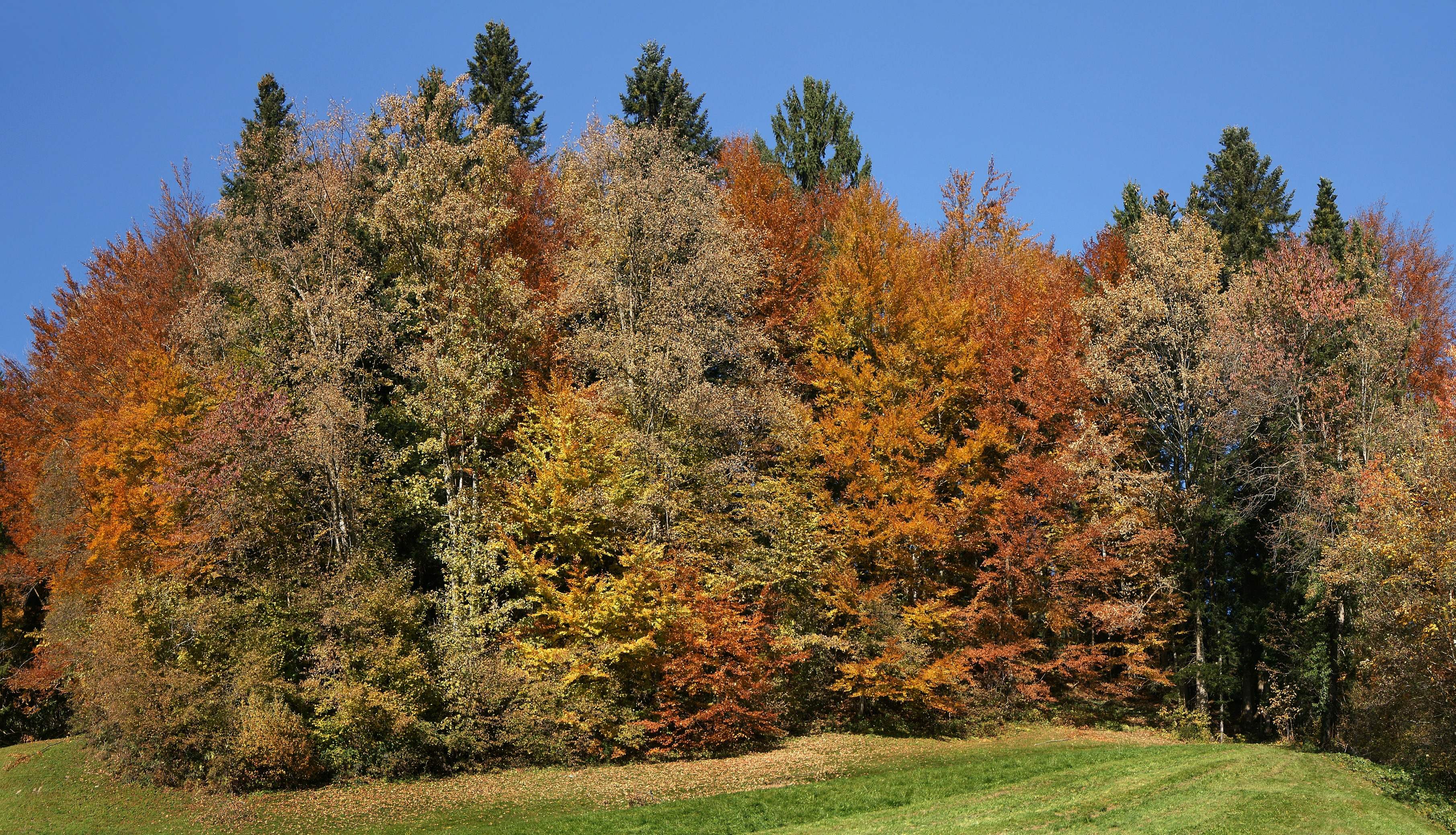 Mischwald am Sulzberg mit Buchen, Ahorn, Eschen Pappeln, Fichten u.a.